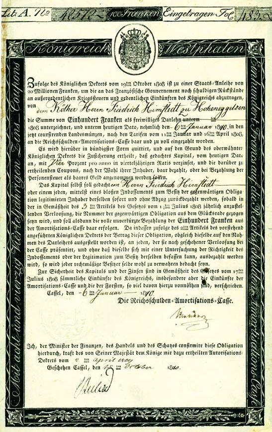 Obligation des Königreichs Westphalen aus dem Jahr 1808